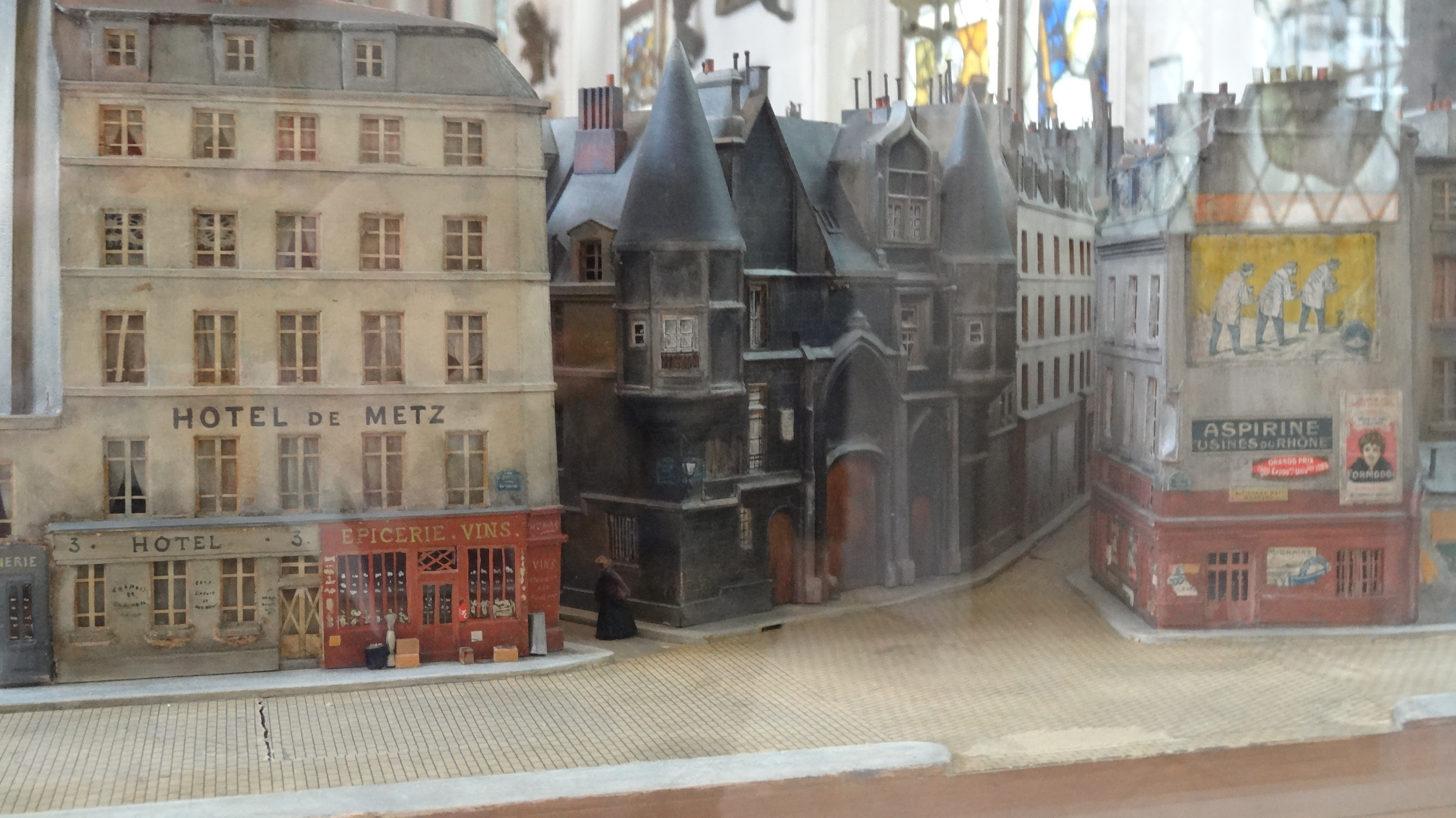 La maquette garde le souvenir d’une partie de «l’ilot insalubre n°16» avant les destructions massives des années 1936-1965